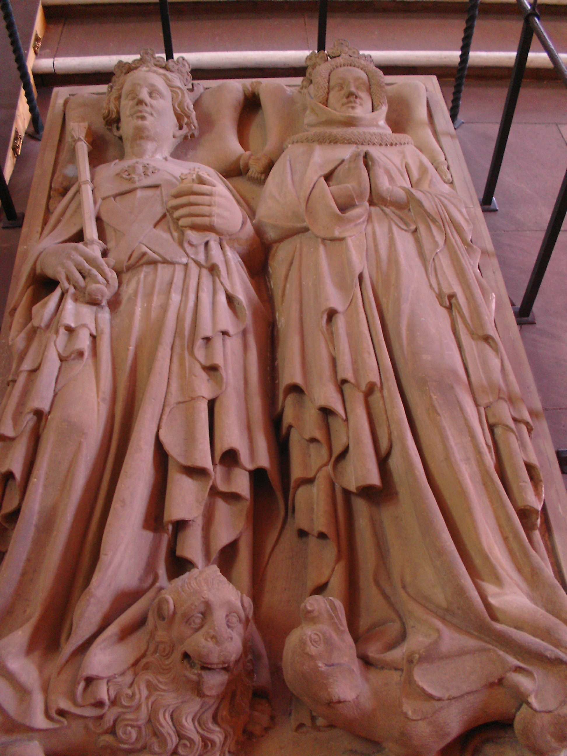 Kurfürst Ruprecht III. von der Pfalz (als Ruprecht I. auch deutscher König) und Gemahlin Elisabeth von Hohenzollern